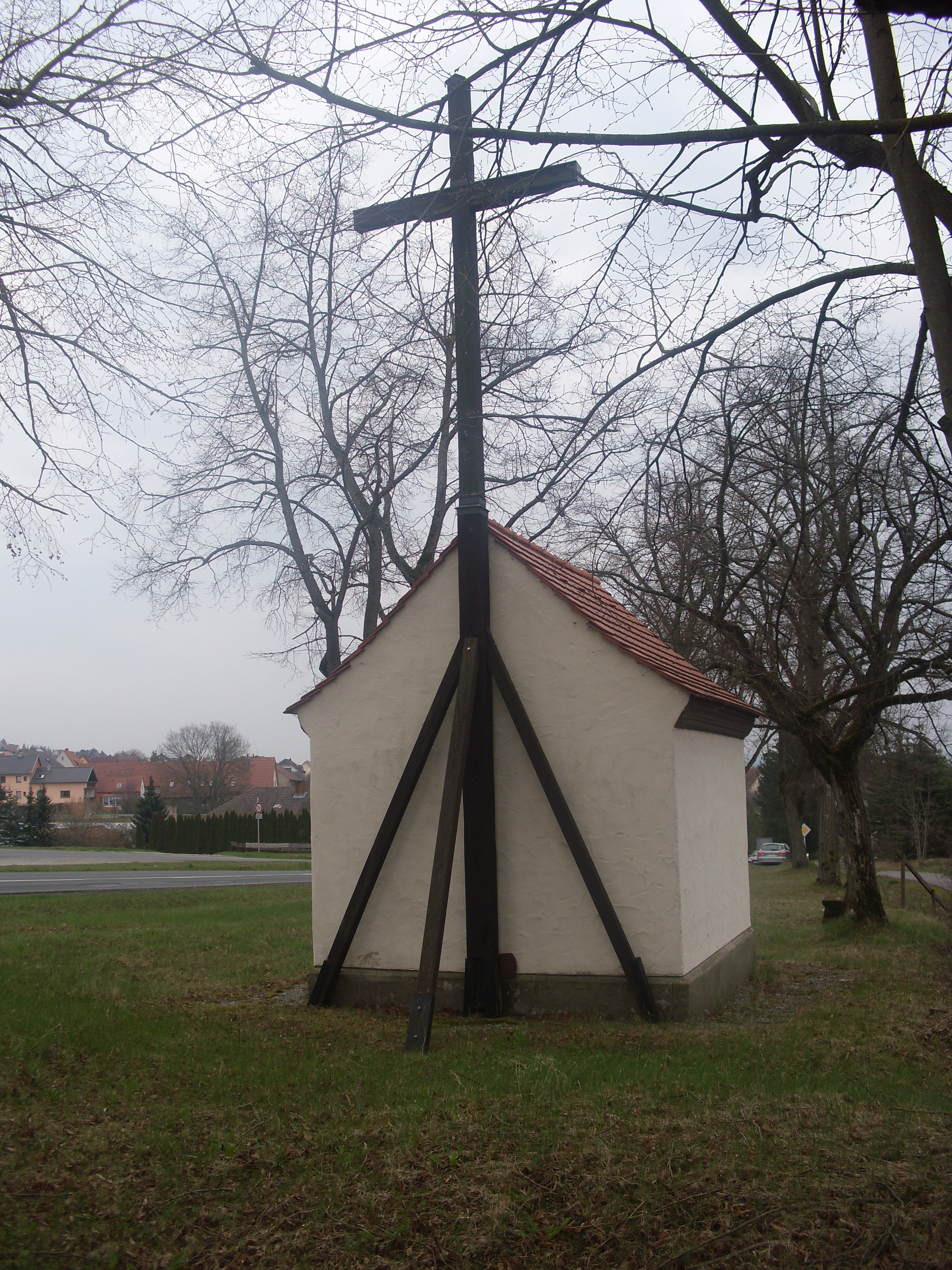 Armenseelenkapelle Hinteransicht v.a. Kreuz